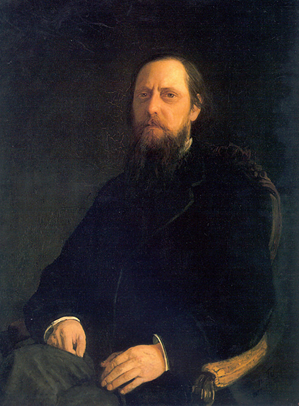 Ге Николай Николаевич. Портрет писателя Михаила Евграфовича Салтыкова-Щедрина (1826-1889). 1872. Русский музей